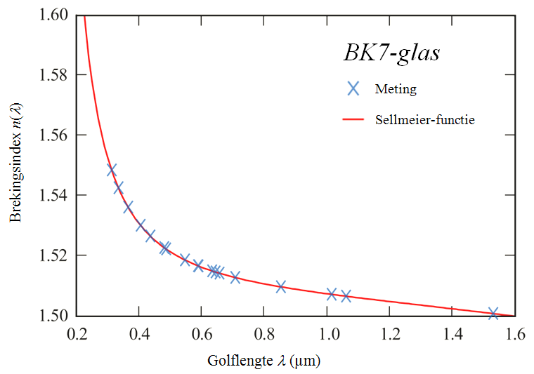 Sellmeiervergelijking